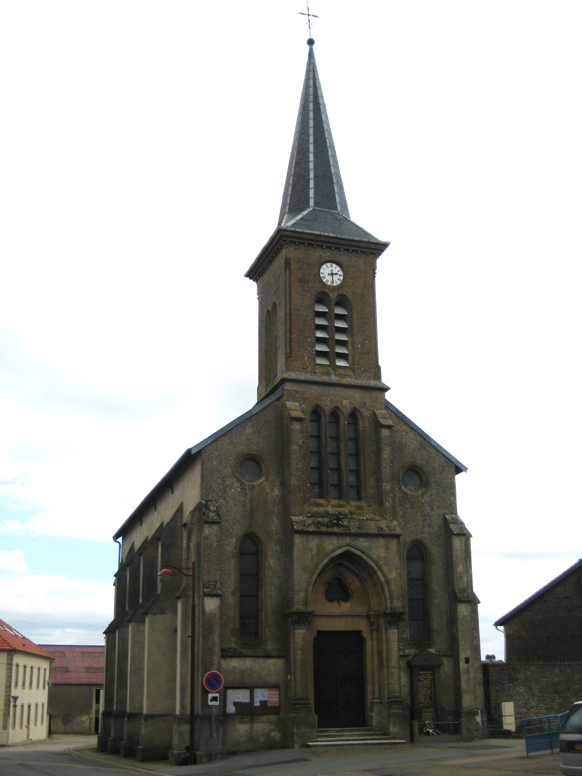 Description Église de BeuvillersDate 16 May 2009Source mon appareil photoAuthor Aimelaime Église de Beuvillers